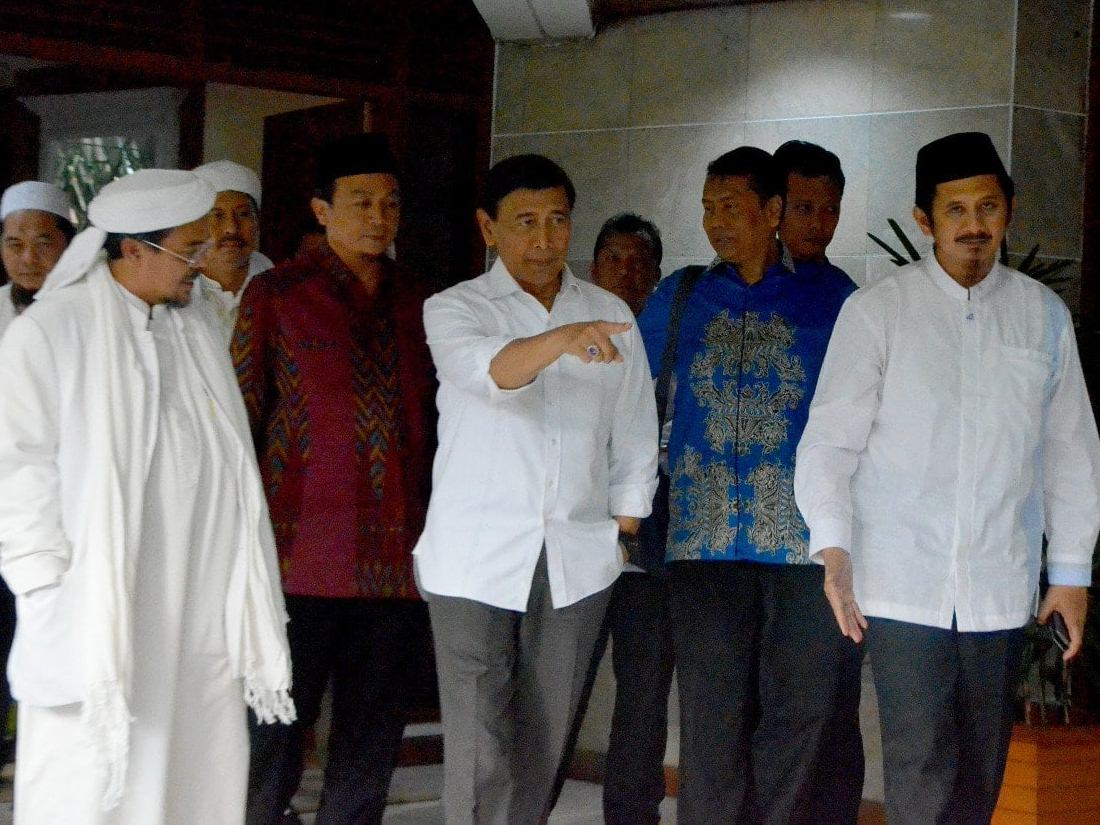 Habib Muhammad Rizieq Shihab (kiri) bersama jajaran tokoh agama dari Front Pembela Islam (FPI) dan Gerakan Nasional Pengawal Fatwa MUI (GNPF MUI) bertemu Wiranto (tengah), Menteri Koordinator Bidang Politik, Hukum, dan Keamanan Republik Indonesia pada tanggal 9 Februari 2017.